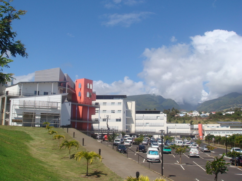 Pôle technologique universitaire de Saint-Denis